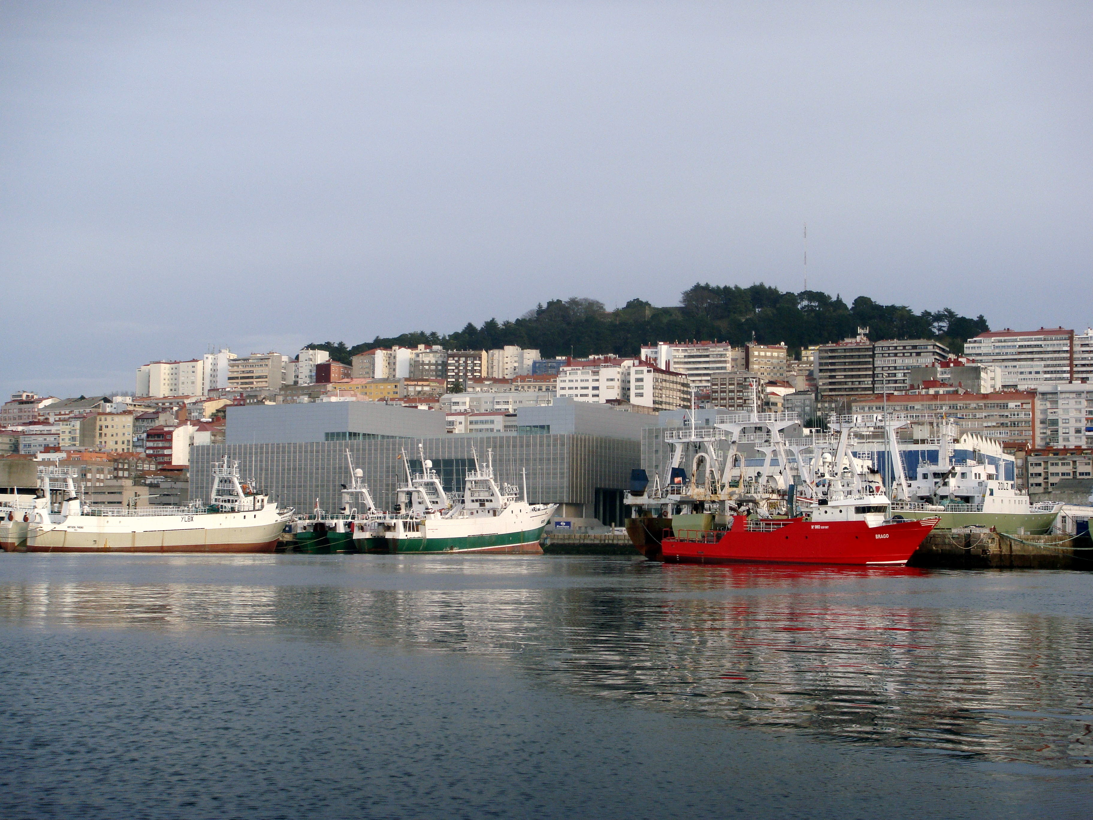 Vigo el auditorio desde el mar